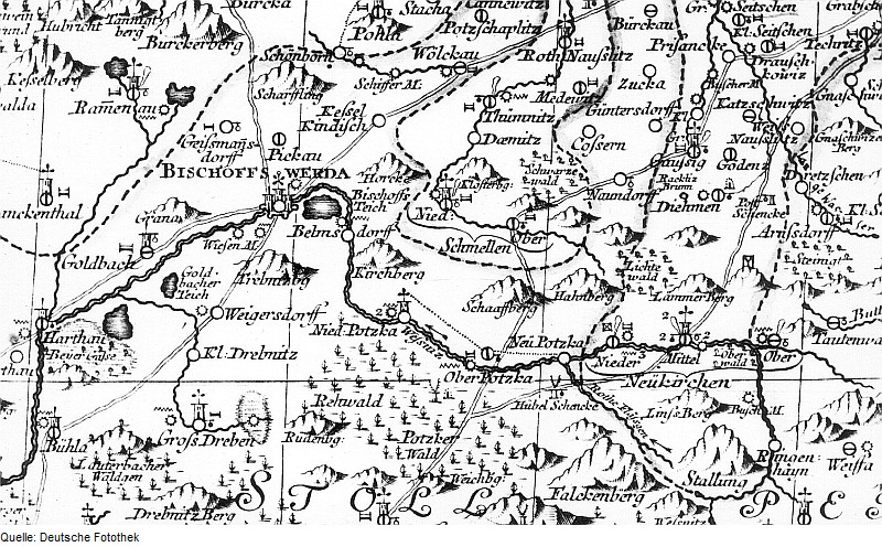 Original image description from the Deutsche Fotothek Bischofswerda. Oberlausitzkarte, Schenk, 1759